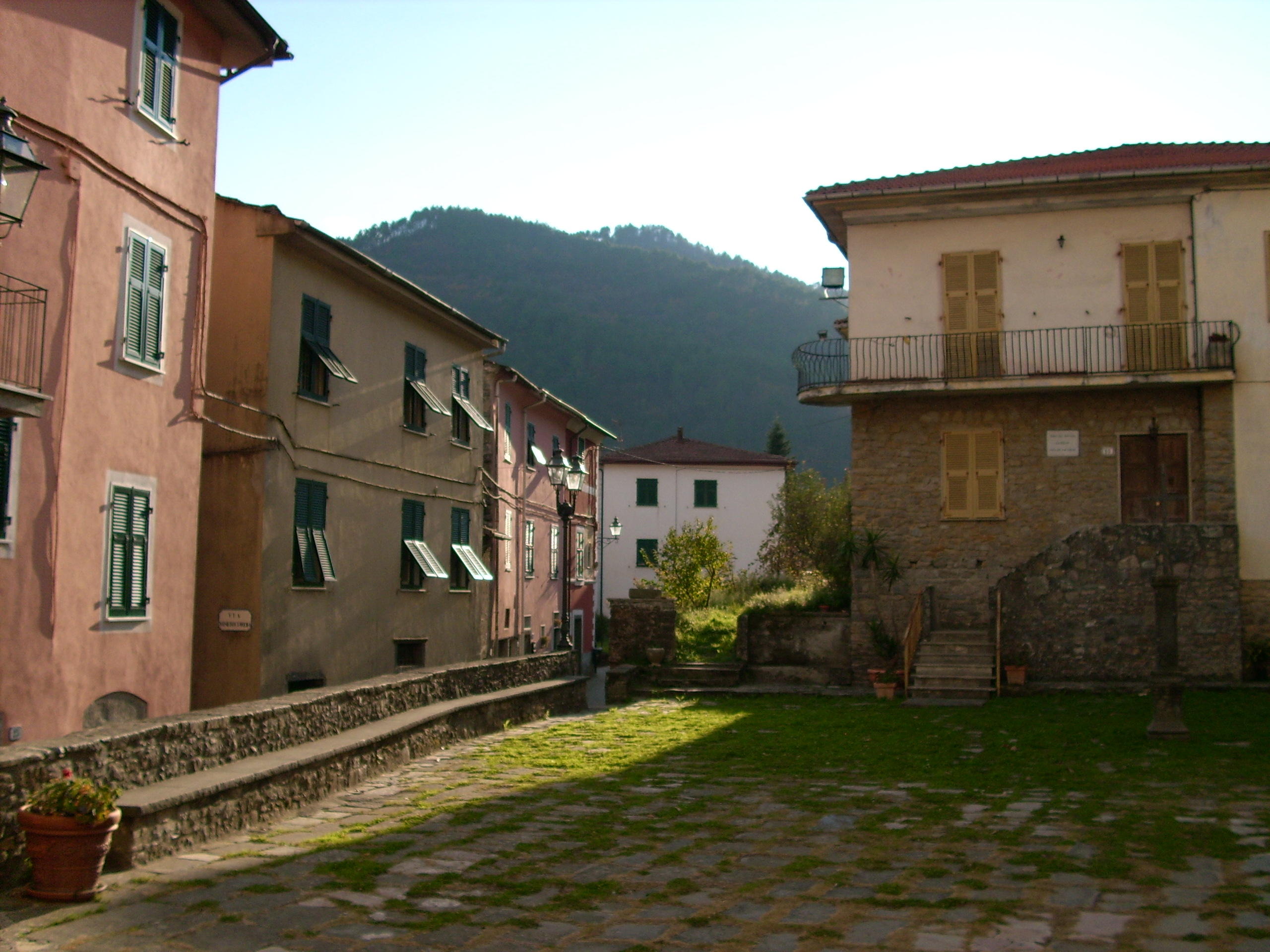 Pignone, Liguria, Italia